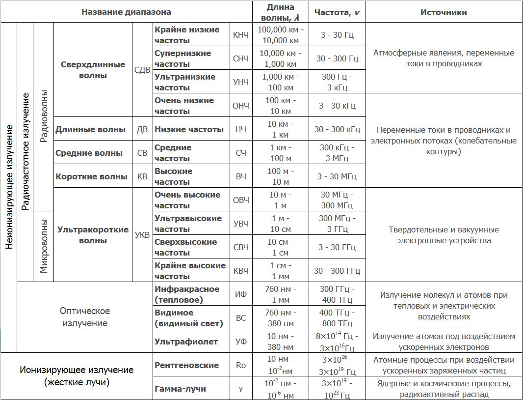 Электромагнитный спектр